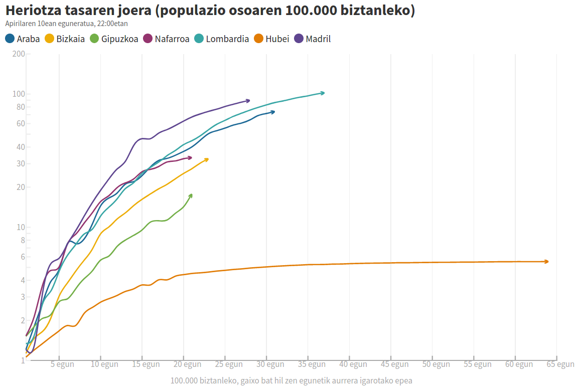 Heriotza-tasaren bilakaera Euskal Herriko herrialdeetan Covid19 krisian (Berria egunkaria, 2020-04-11). Eskala logaritmokoan